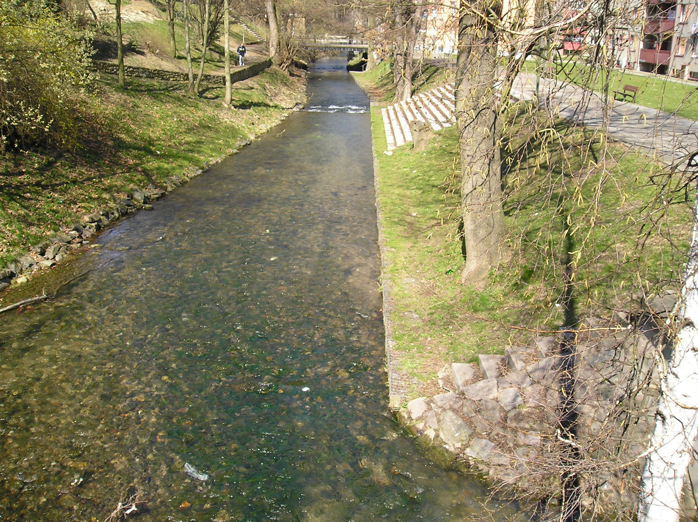 Řeka Loučná protékající Litomyšlí nedaleko Smetanova domu